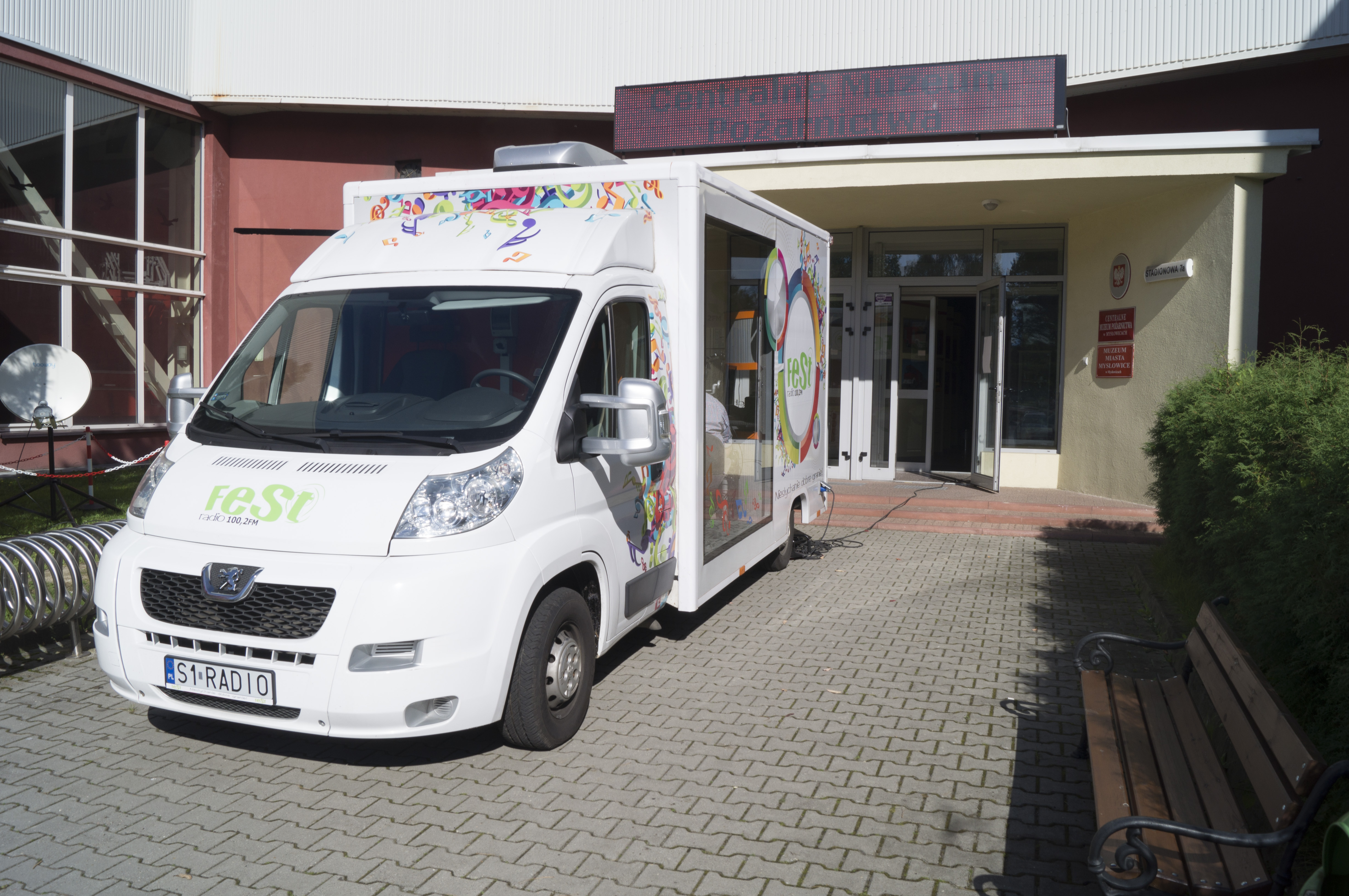 Radiowóz Radia Fest Podczas akcji promocyjnej w Mysłowicach